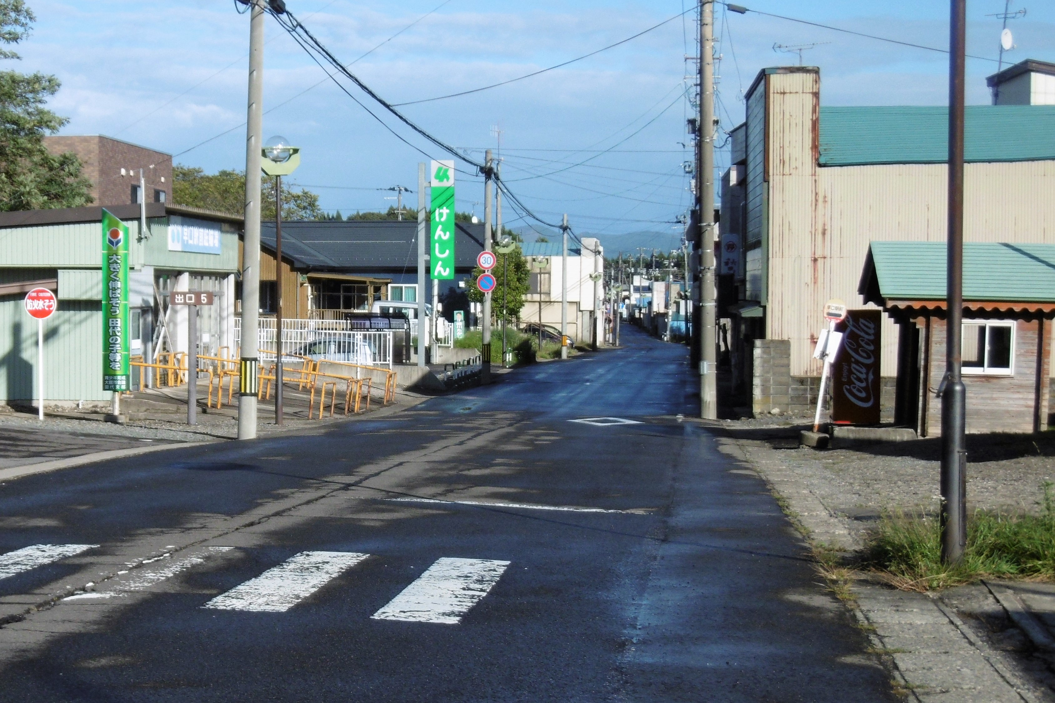 早口駅前の風景：秋田県大館市